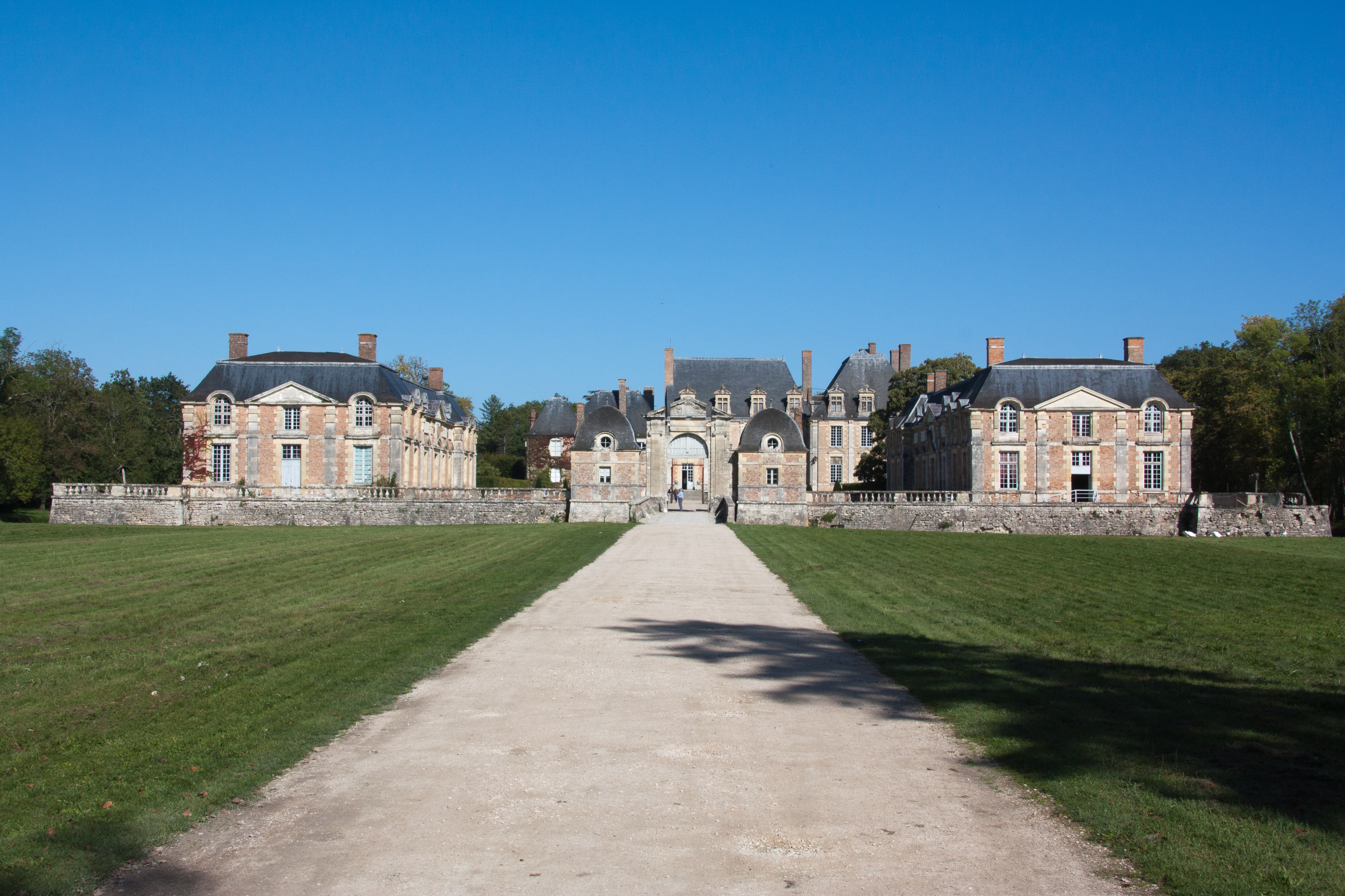 Château de la Ferté - La Ferté-Saint-Aubin, Loiret, France.